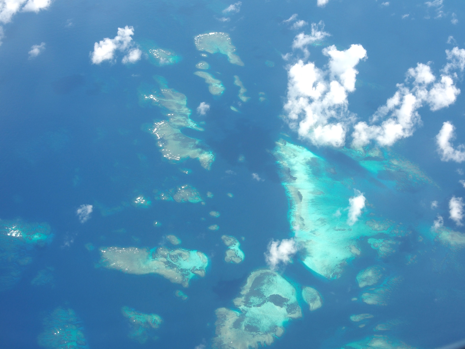 八重干瀬（沖縄県宮古島市）